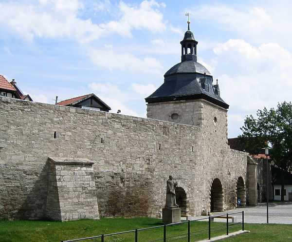 Stadtmauer in Mühlhausen am Frauentor. Hier befindet sich das Stadtmauermuseum.